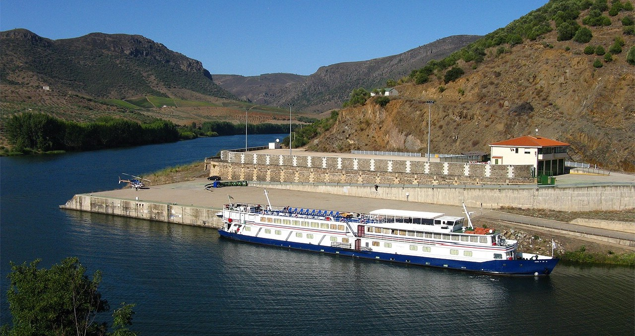 Foto tirada da ponte internacional ferroviária. Atenção que este cais já é em Espanha